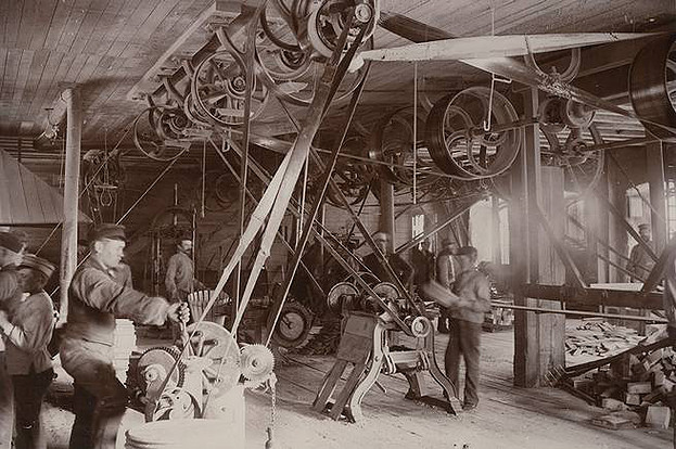 Lars Monténs Fabriker, tunnbinderiet, Alviks Strand, Alvik, Bromma, Stockholm, 1881-1936.